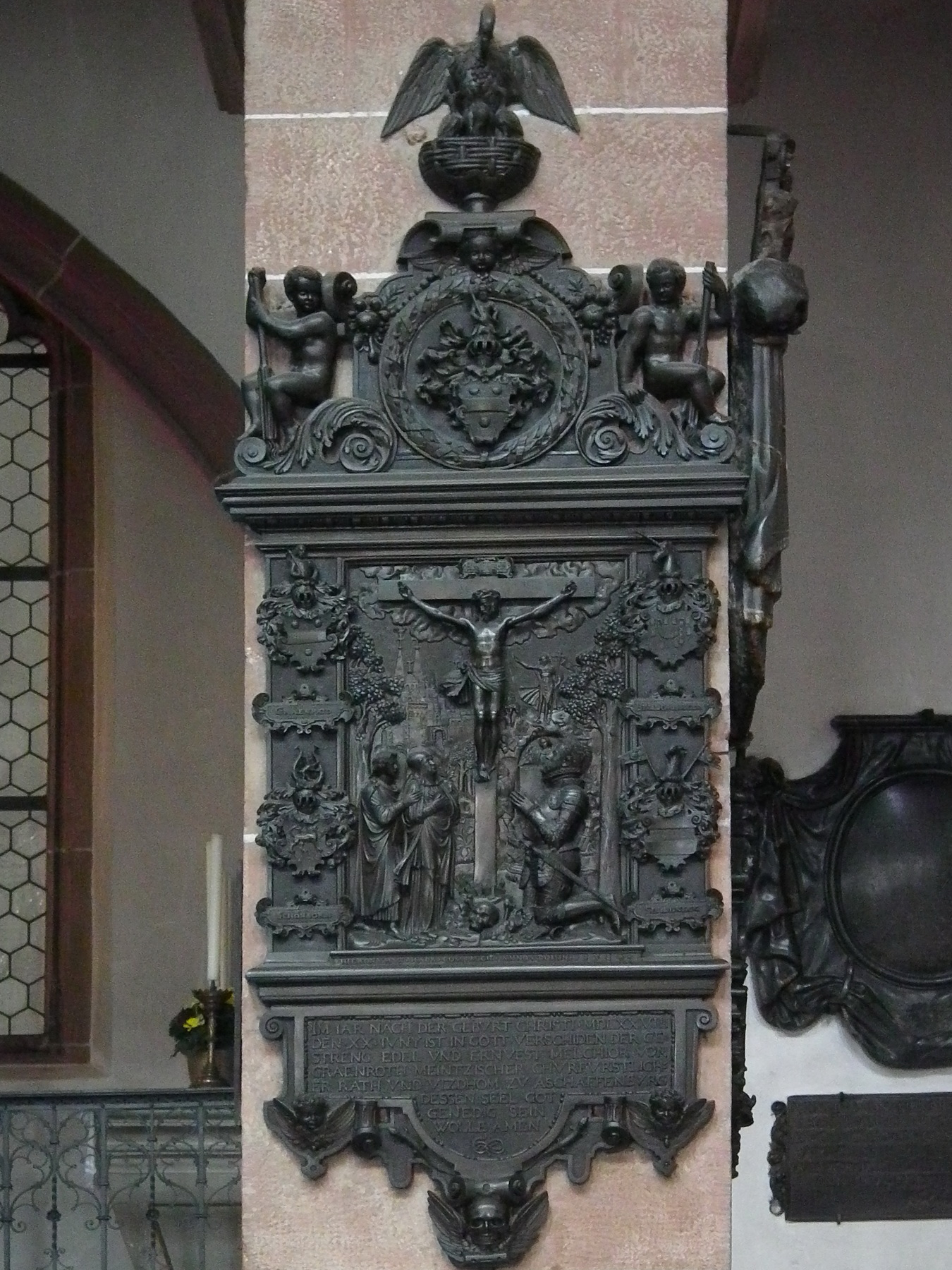 Lower Franconia, Germany Stiftskirche St. Peter und Alexander, Epitaph des Vizedoms Melchior von Grönroth † 1578